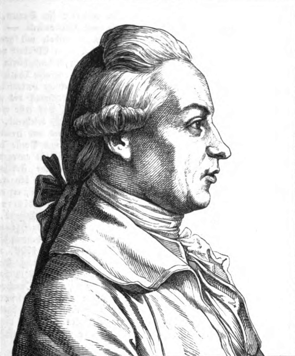 Johann Wilhelm von Archenholz